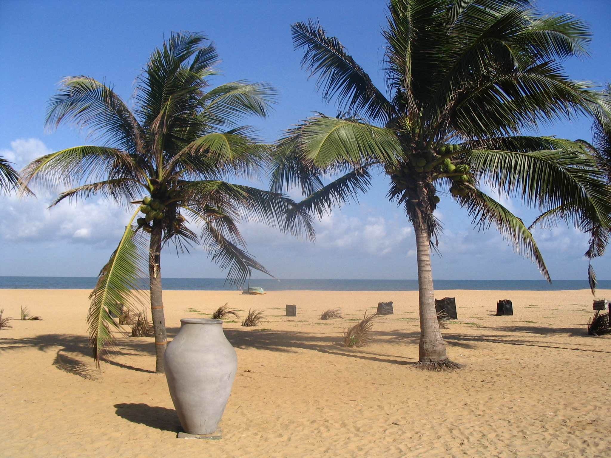 Negombo Beach, Sri Lanka